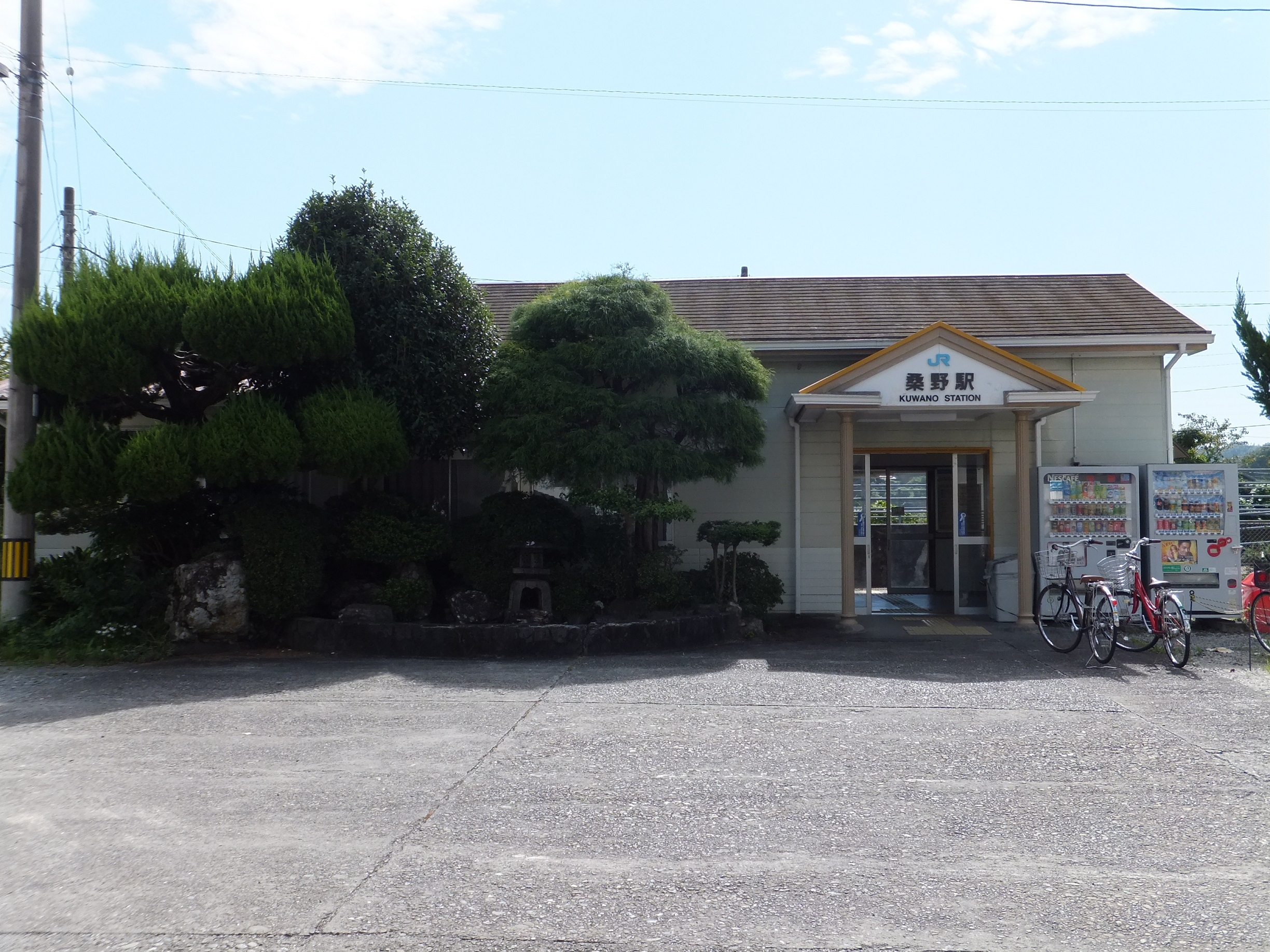 徳島県阿南市 JR牟岐線桑野駅 2015年9月